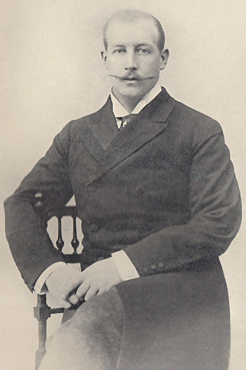 Prince George of Greece in 1902, High Commissioner in Crete.